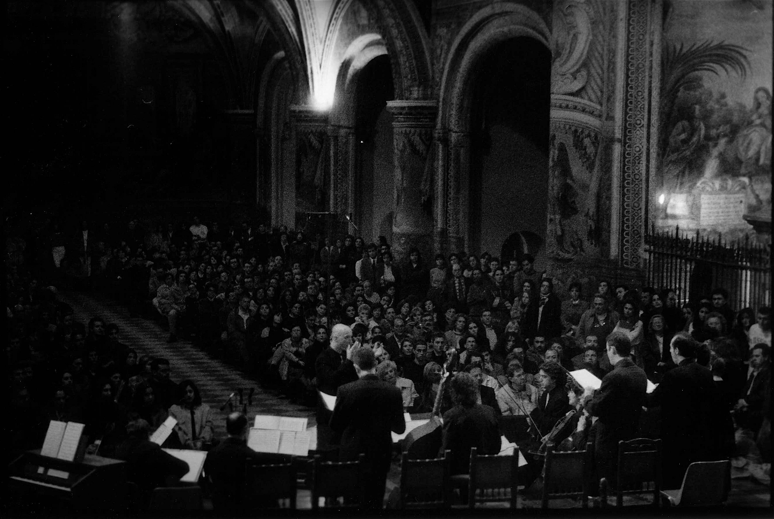 Los Extravagantes en Granada (España), 1998. De izquierda a derecha se distinguen: Francisco Hervás (laúd); Darío Moreno (clave), Juan Luis Martínez (dirección), Josep Miquel Ramon (barítono), Xavier Astor (contrabajo) Carles Fibla y Elena Borderías (violines).